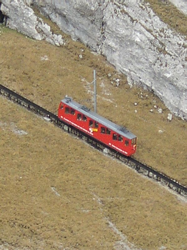 Pilatus_20